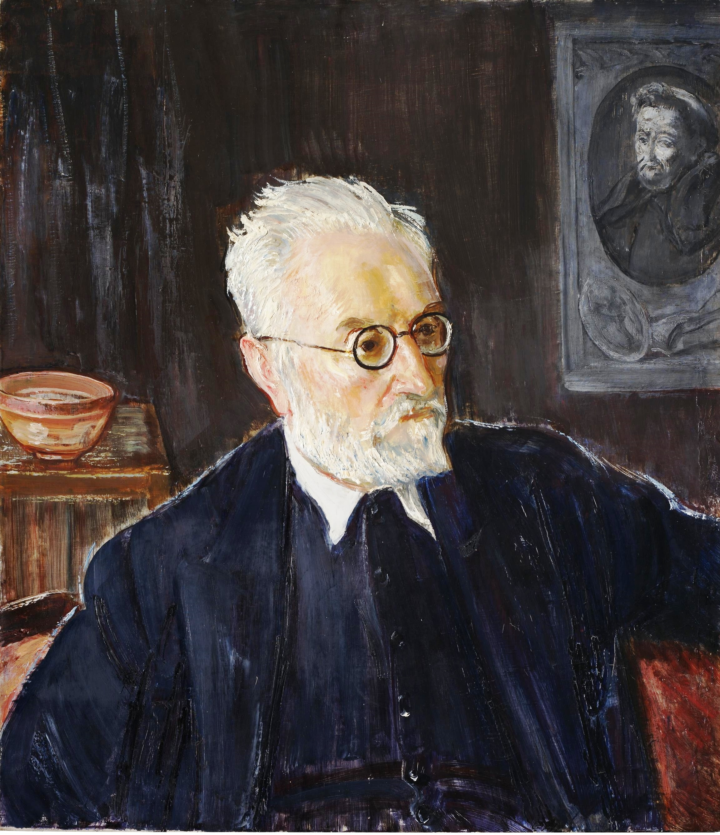 Retrato del filósofo y escritor Miguel de Unamuno (1864-1936), que llegó a ser rector de la Universidad de Salamanca.